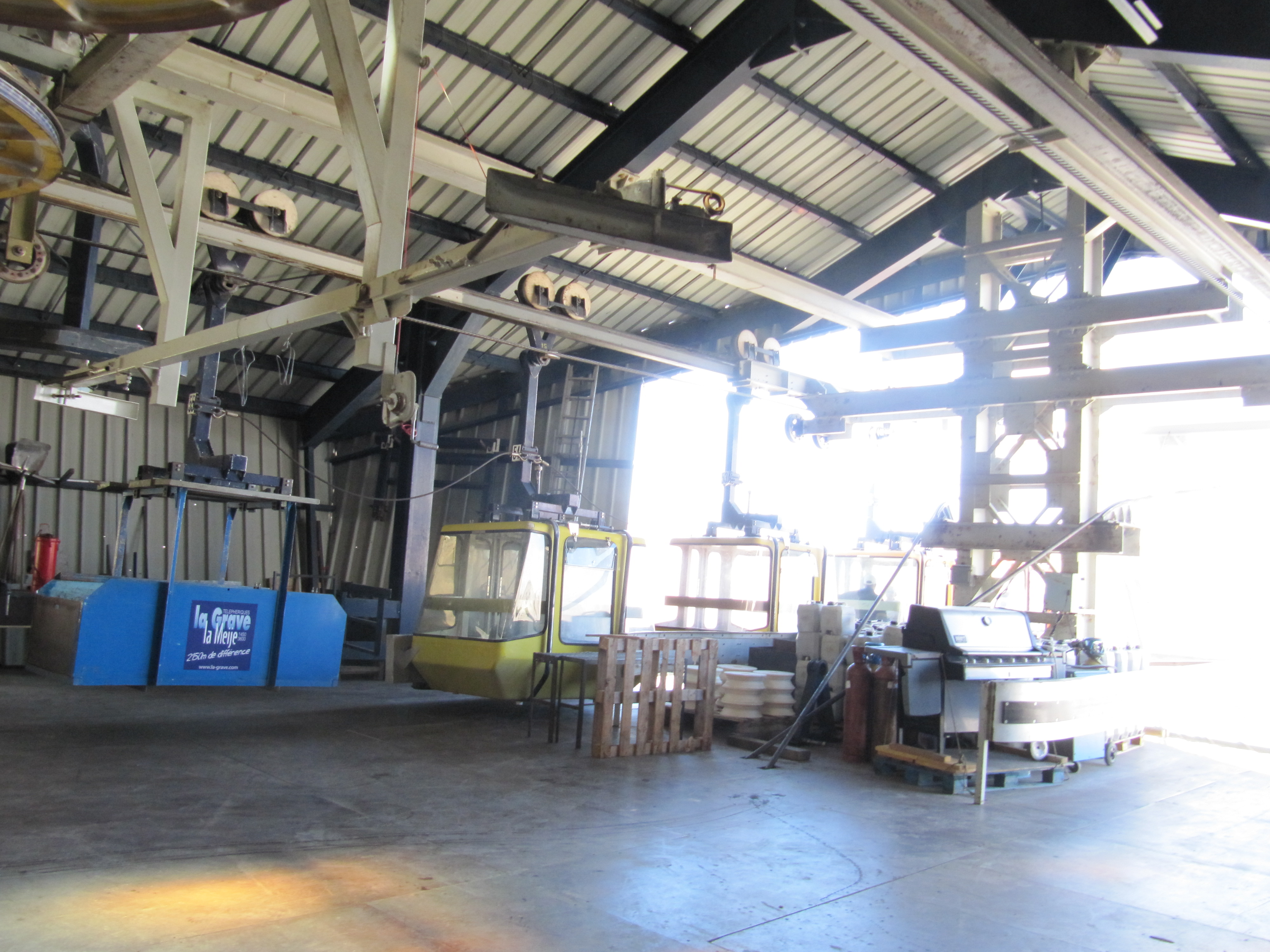 l'intérieur de la gare amont du premier tronçon du 2S Pulsé de la Grave